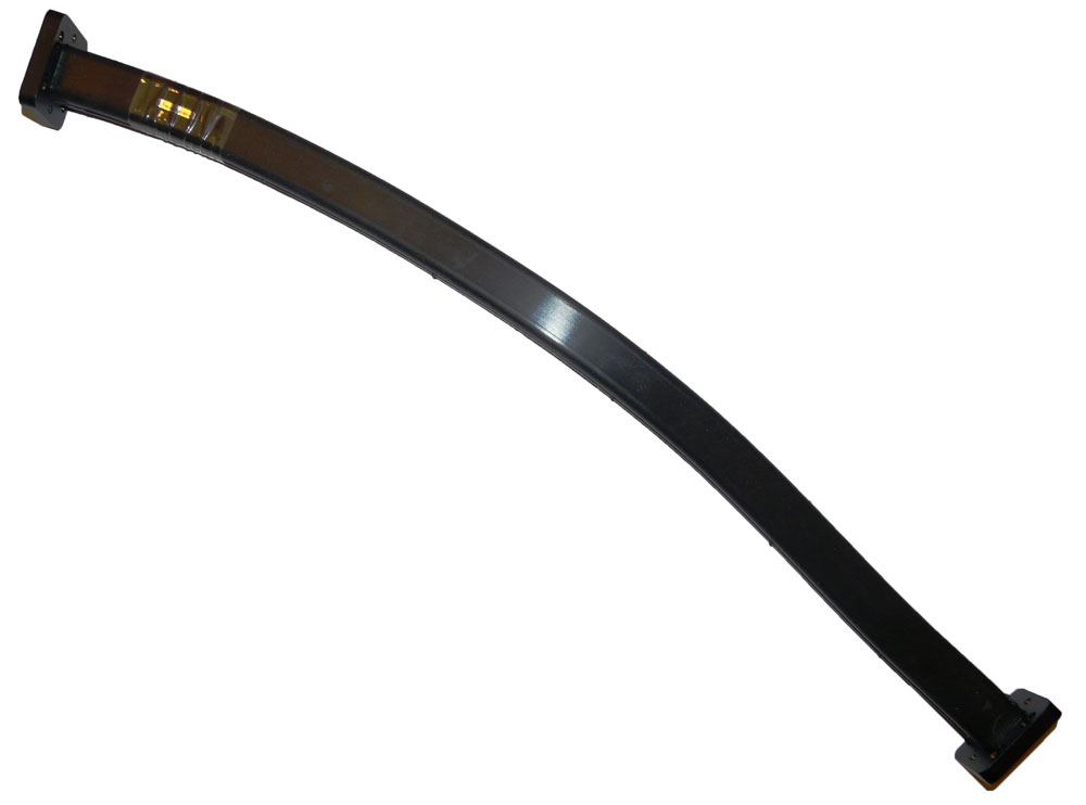 Металлический волновод с прямоугольным фланцем. Москва.